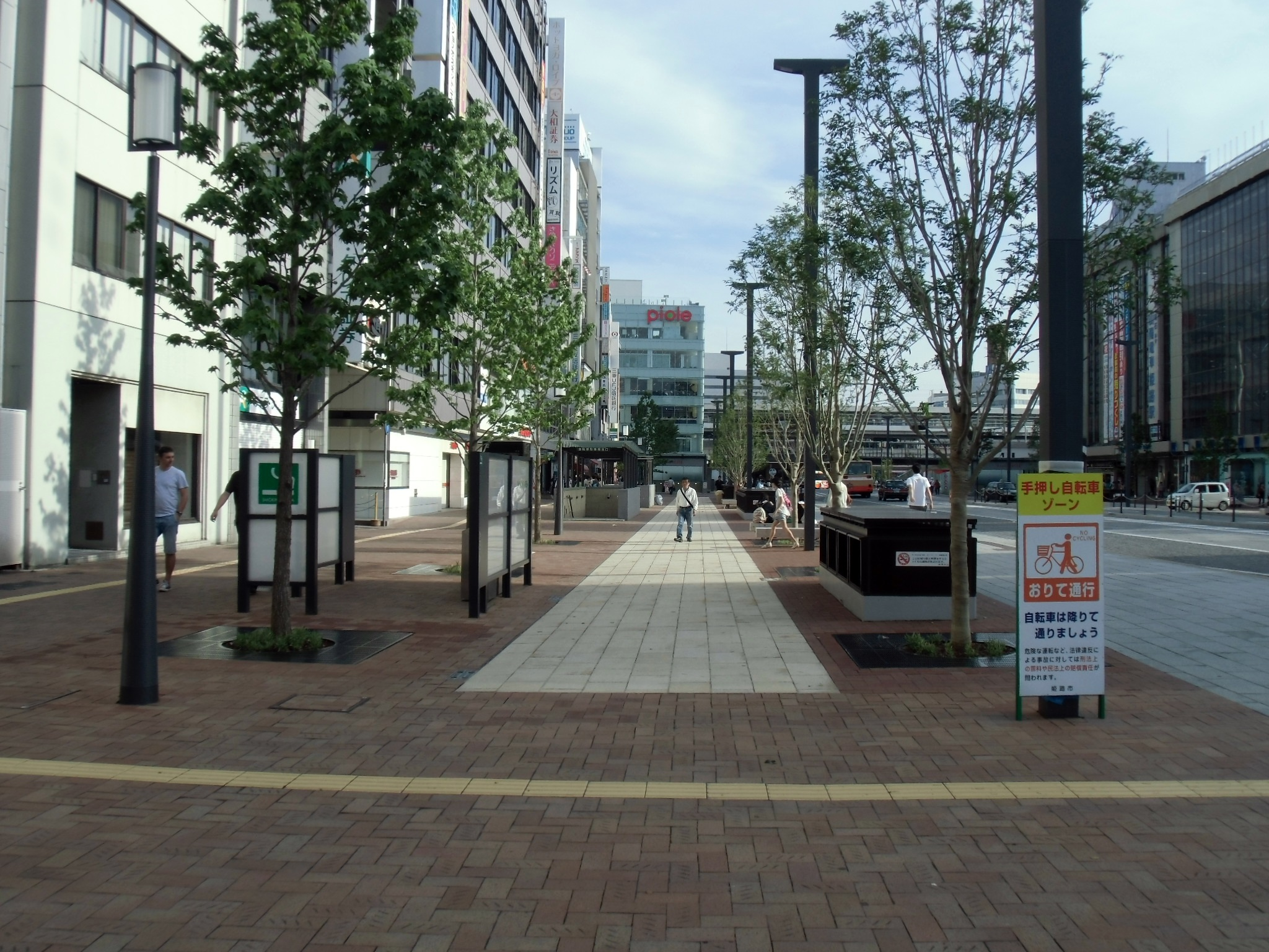 姫路市のメインストリート大手前通り。トランジットモール化で拡幅された歩道